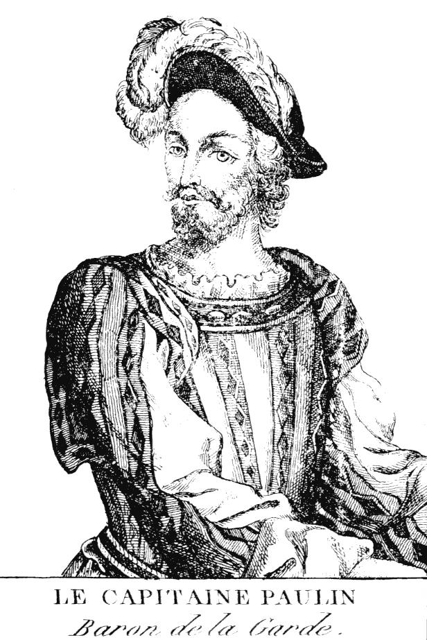 Antoine Escalin (gravure in Richer, "Vie des marins célèbres", 1789